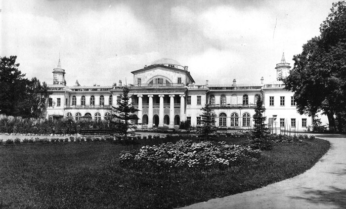 218. Домъ на бывшей Мамоновской дачЪ близъ Воробьевыхъ горъ.